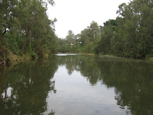 La richmond River à Casino en Nouvelle-Galles du Sud en Australie